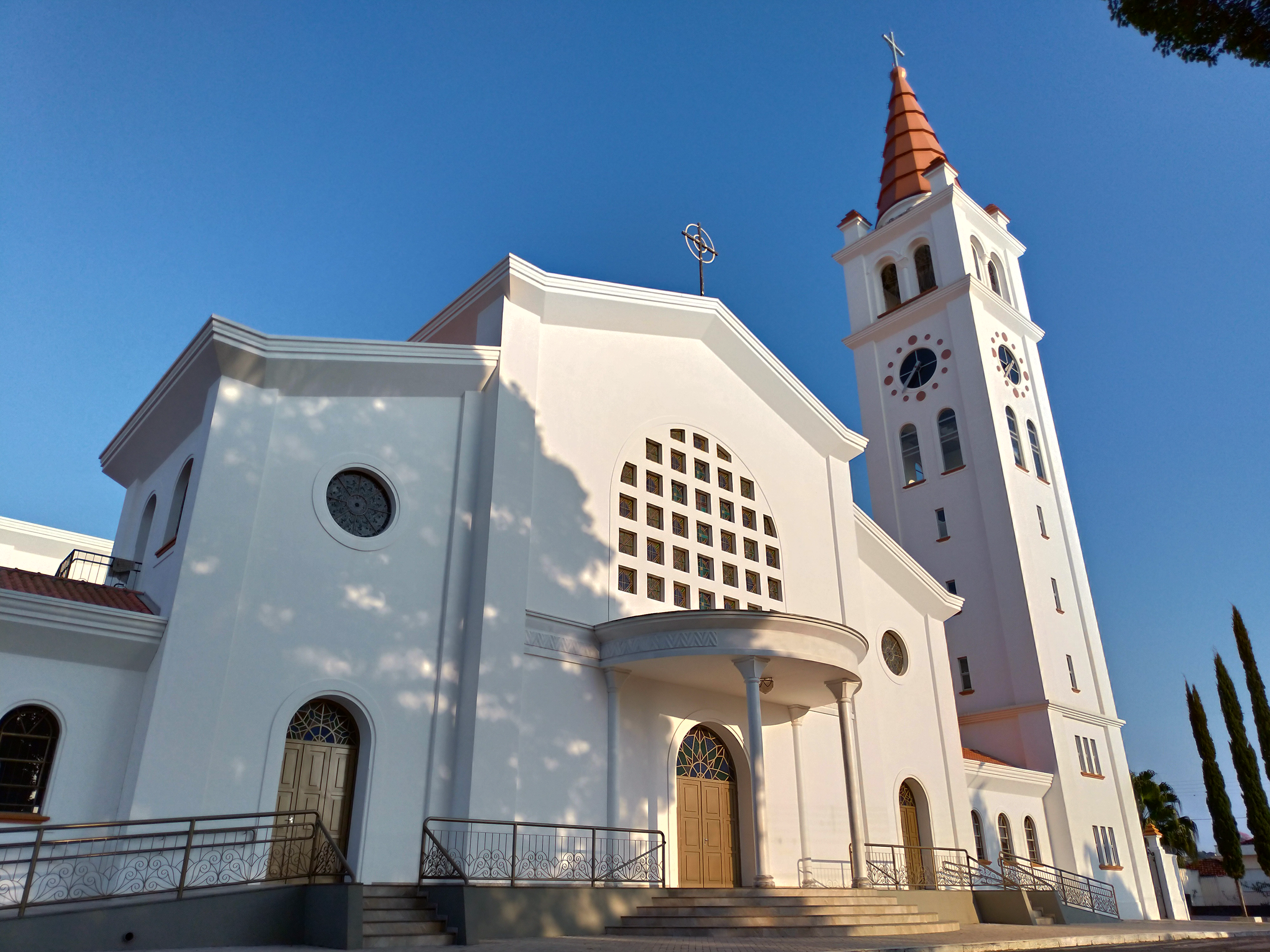 Igreja Matriz de Itararé-SP